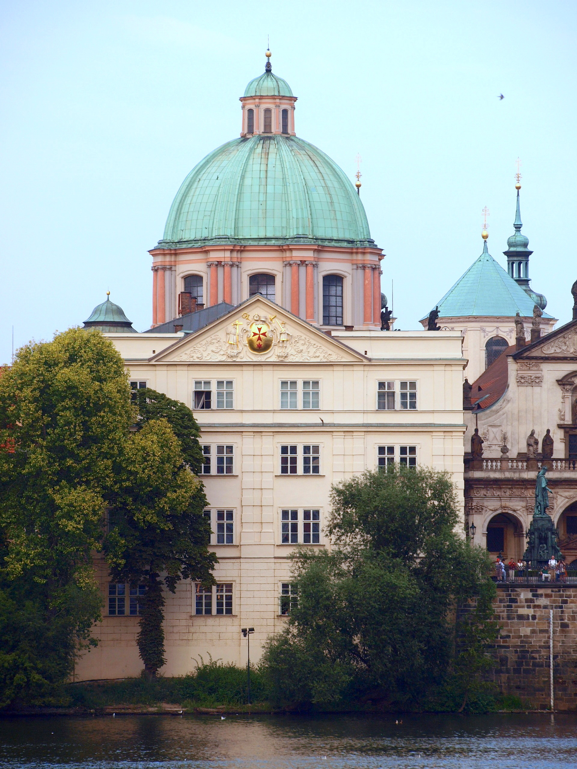 Praha, kostel sv. Františka z Assisi